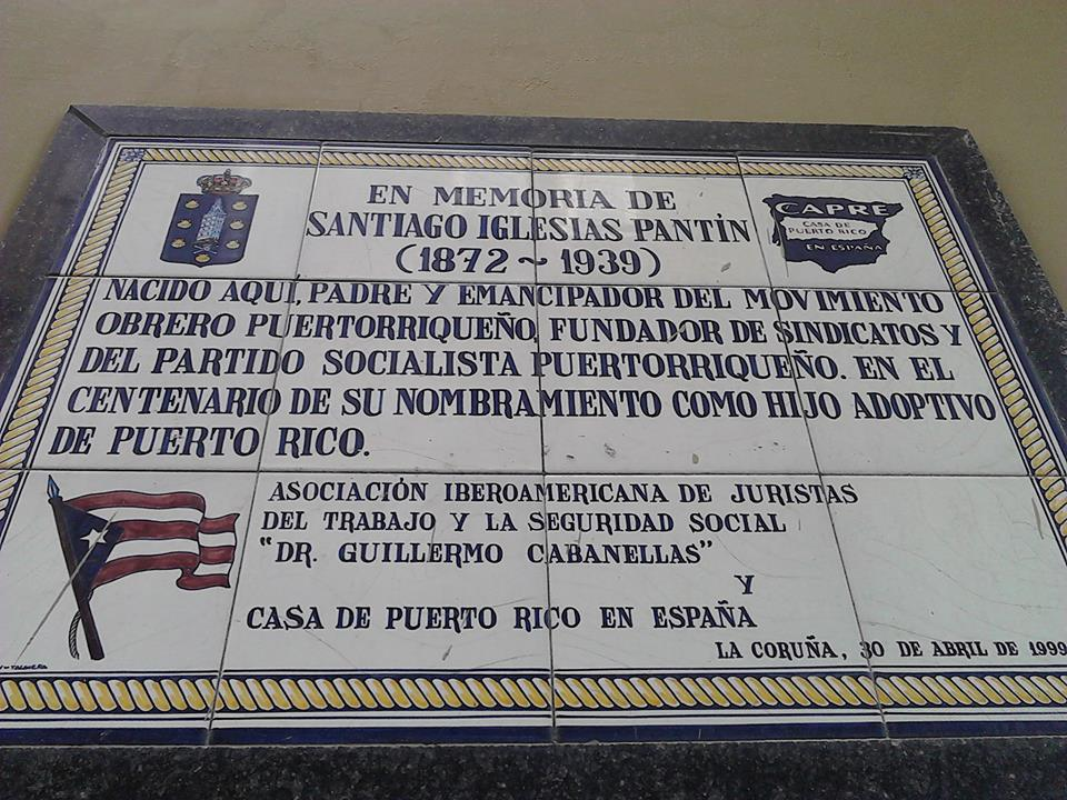 Placa conmemorativa de Santiago Iglesias Pantin en su casa de nacimiento.